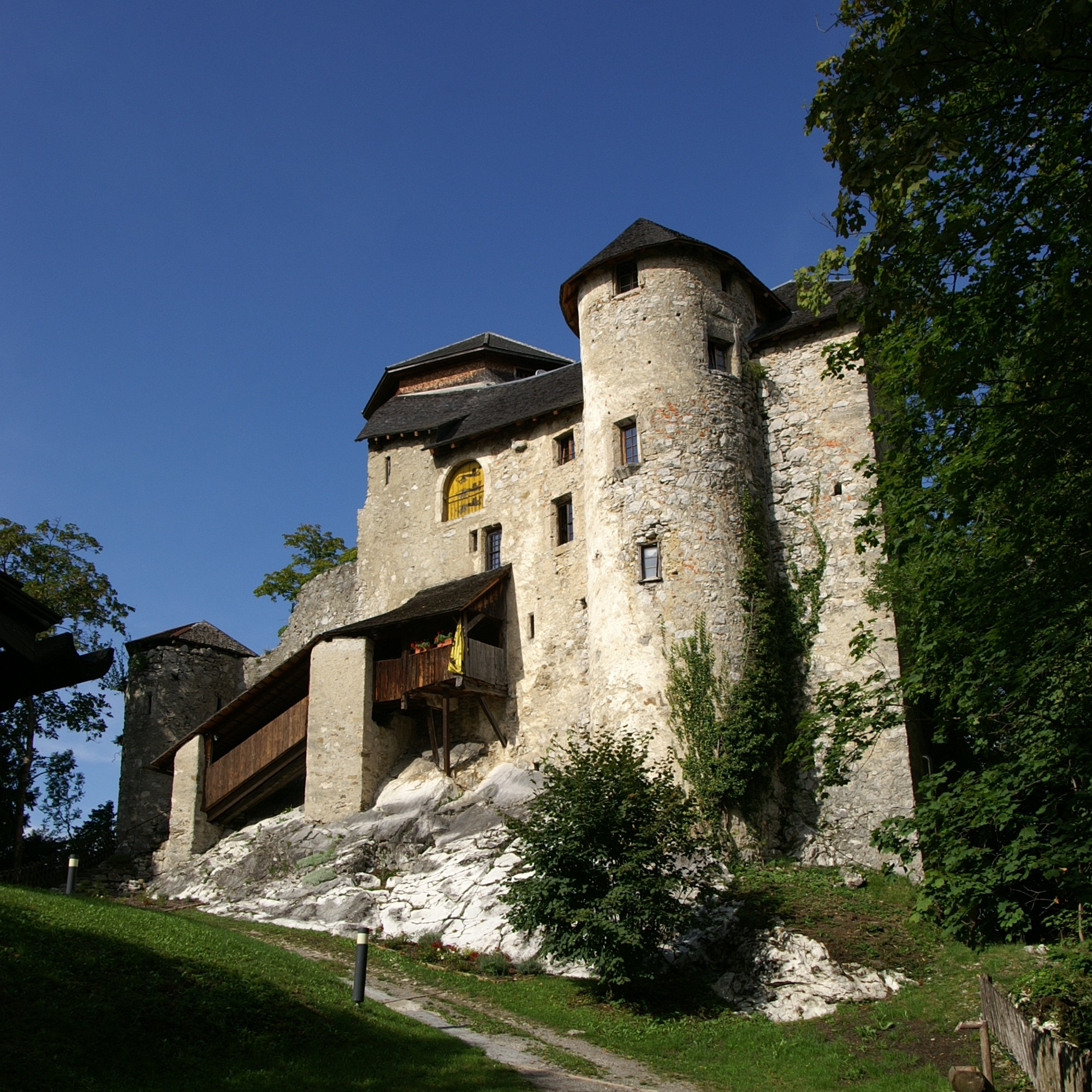 Burg Neu-Ems (Schloss Glopper), in Hohenems, Vorarlberg Dieses 1343 erbaute Schloss wurde nach seiner Zerstörung im Appenzellerkrieg (1407) wieder aufgebaut. Spätgotische Anlage von seltener Geschlossenheit (kleinräumige Hochburg mit bergfriedartigem Bollwerk und angebautem Palas). Privatbesitz der Grafenfamilie Waldburg-Zeil. *** Veröffentlicht: Georg Kessler in "Freizeit im Ländle, Die schönsten Ausflugziele in Vorarlberg ISBN 978-3-7022-3068-5 2010. *** Veröffentlicht: Gunnar Strunz in "VORARLBERG Mit Bregenzerwald, Großem Walsertal, Arlberg und Montafon ISBN 978-3-89794-280-6 2. Auflage 2014 ohne Lizenzangabe. (Quelle: )